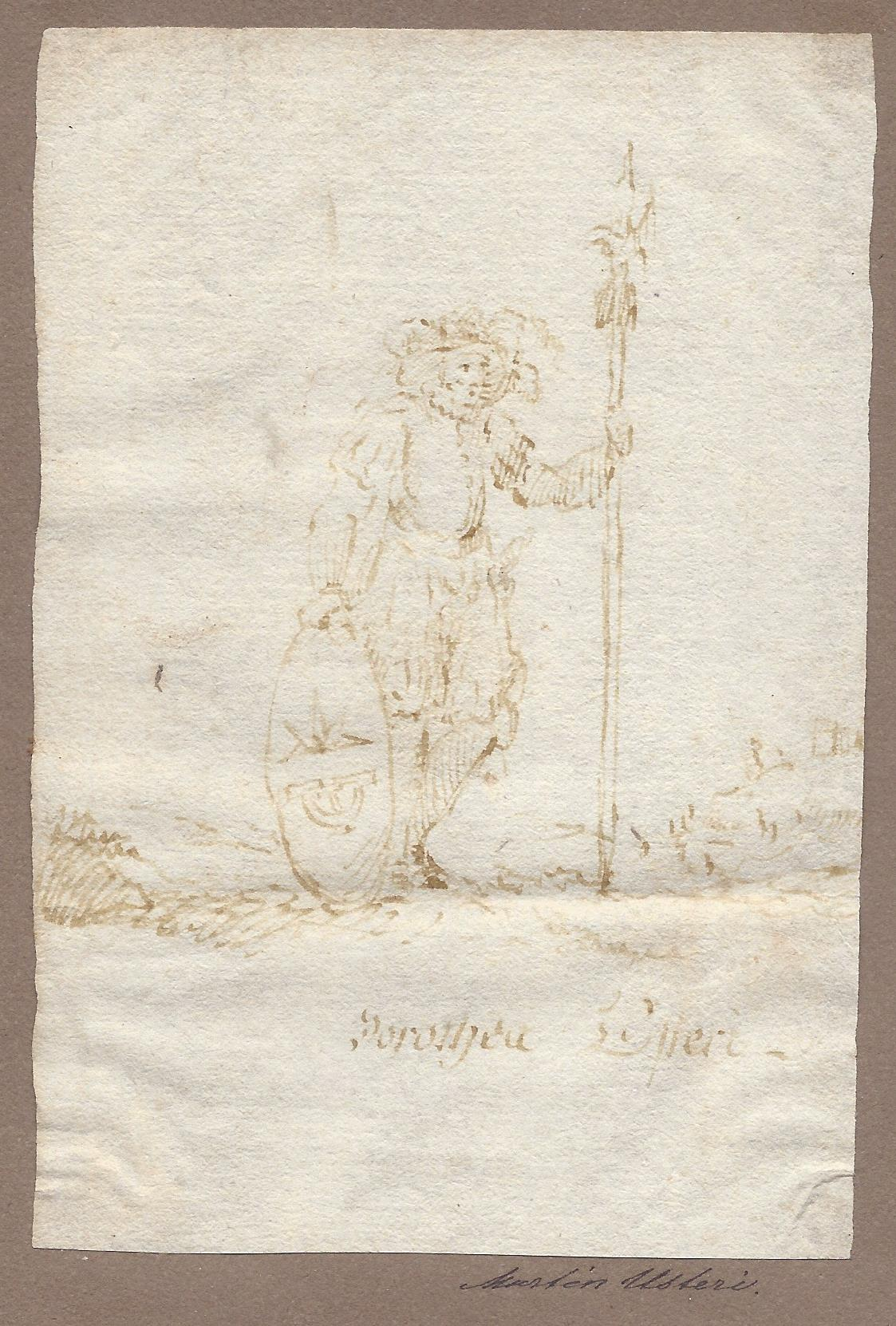 Johann Martin Usteri: Schildträger mit dem Wappen der Familie Usteri. Ex-Libris-Entwurf für die Schwester Dorothea Usteri, Tuschzeichnung um 1780.